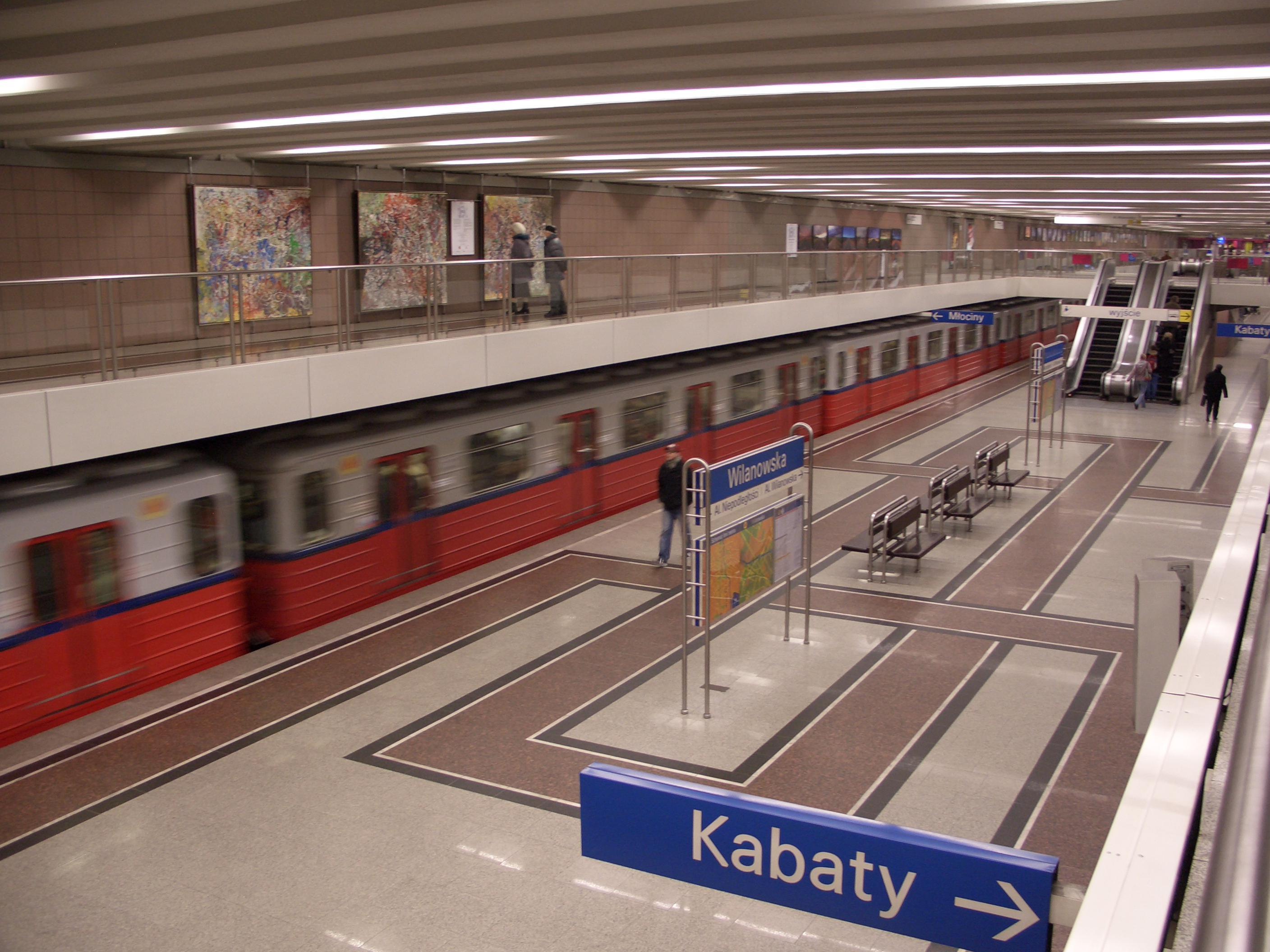 Stacja Wilanowska - Metro Warszawskie/Wilanowska Station - Warsaw Metro. Na stację wjeżdża skład serii 81/A series 81 train is entering the station.